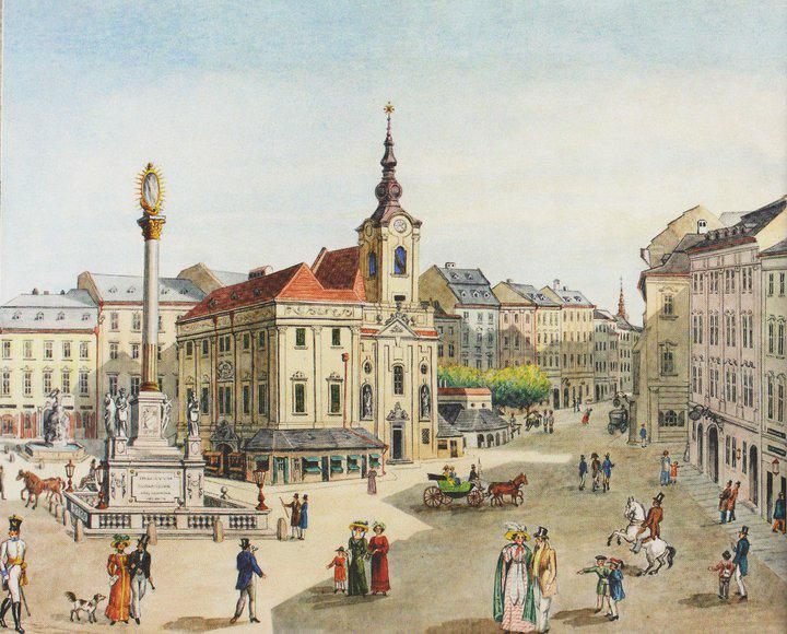 Pohled na zaniklý kostel svatého Mikuláše v Brně - dílo Franze Richtera